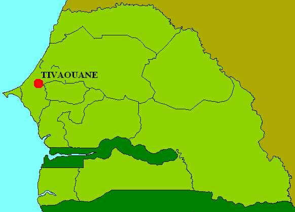 Localisation de Tivaouane au Sénégal